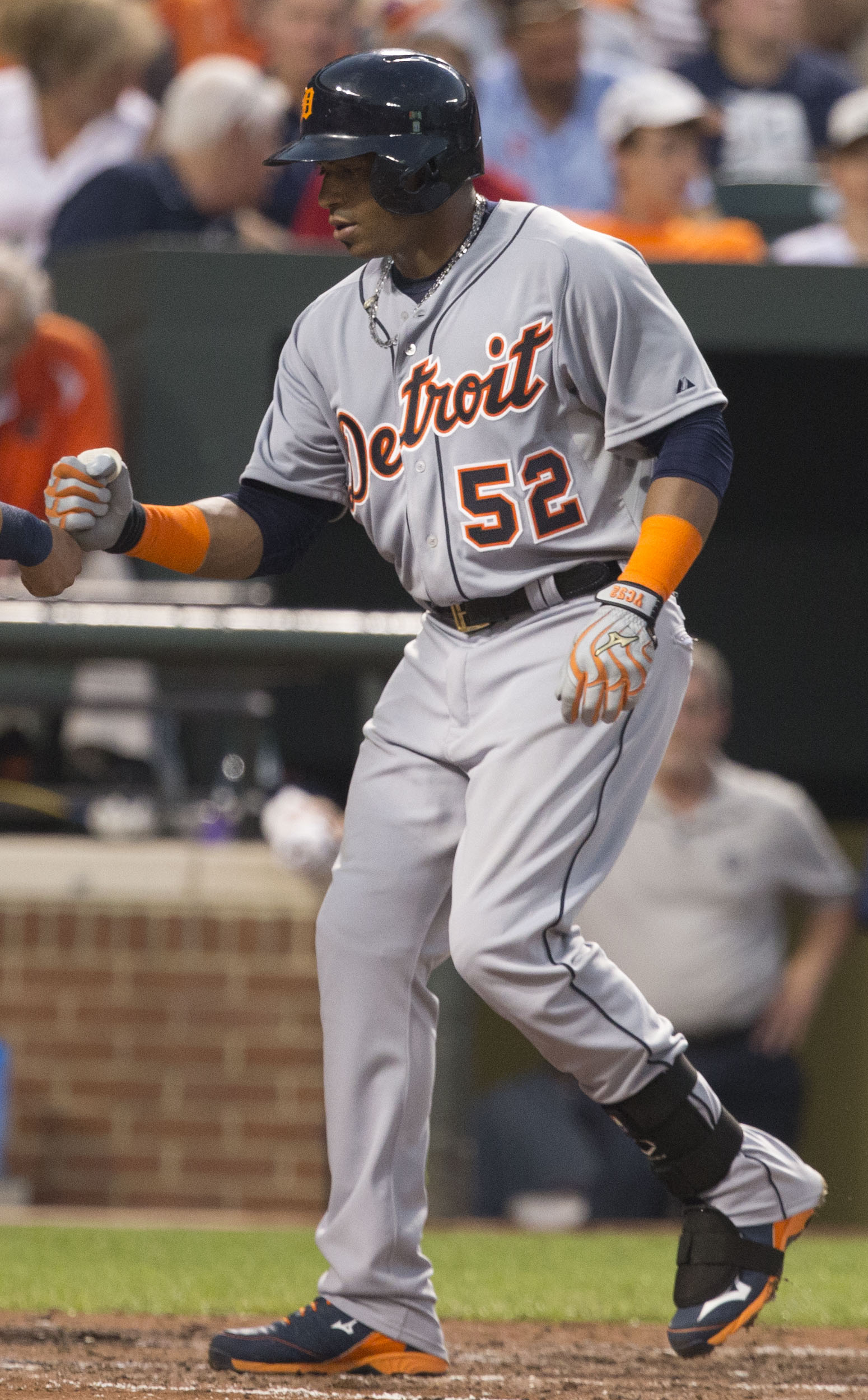 Yoenis Céspedes